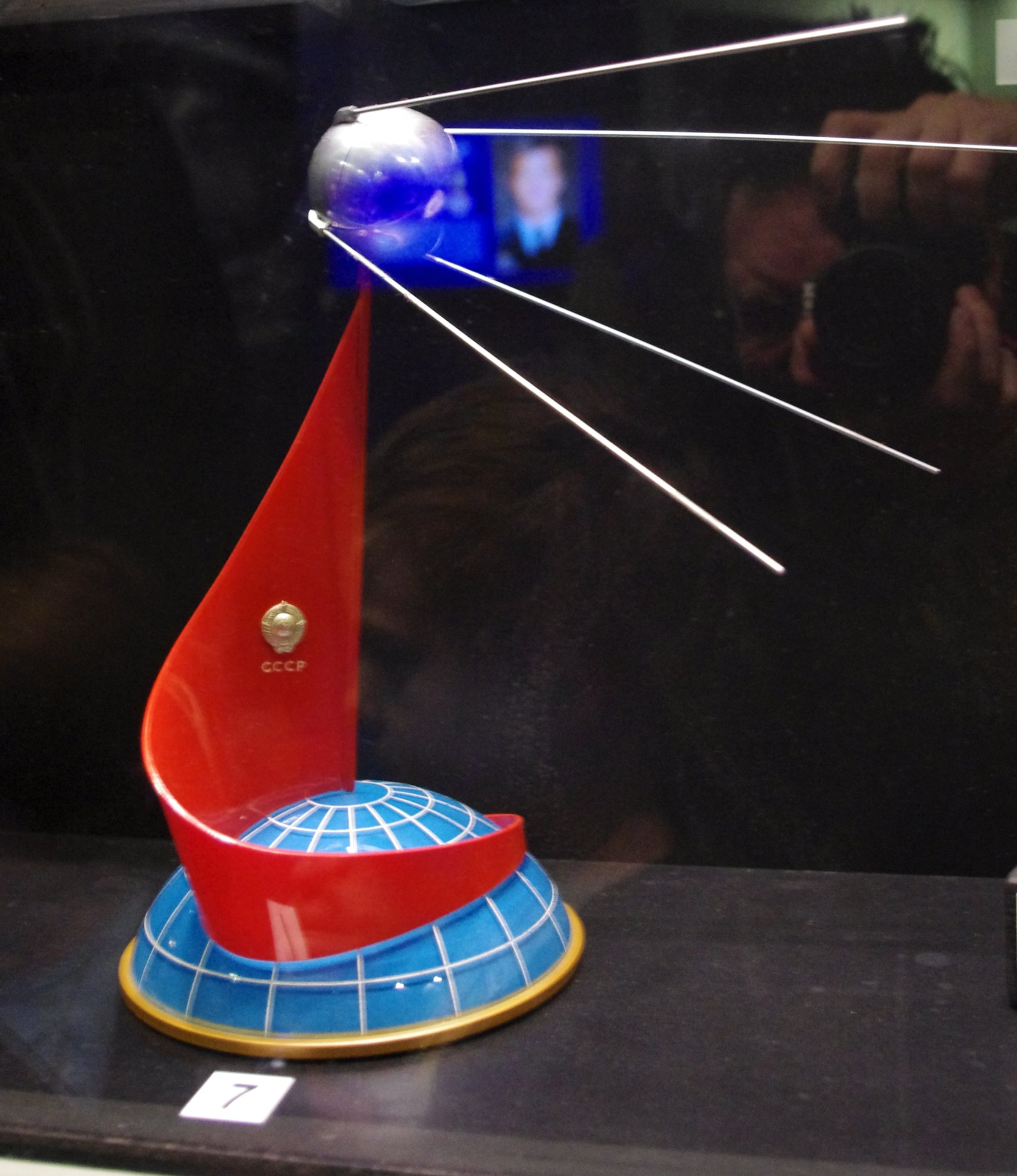 Sputnik souvenir. From "NASA - A Human Adventure" at Tekniska museet in Stockholm.